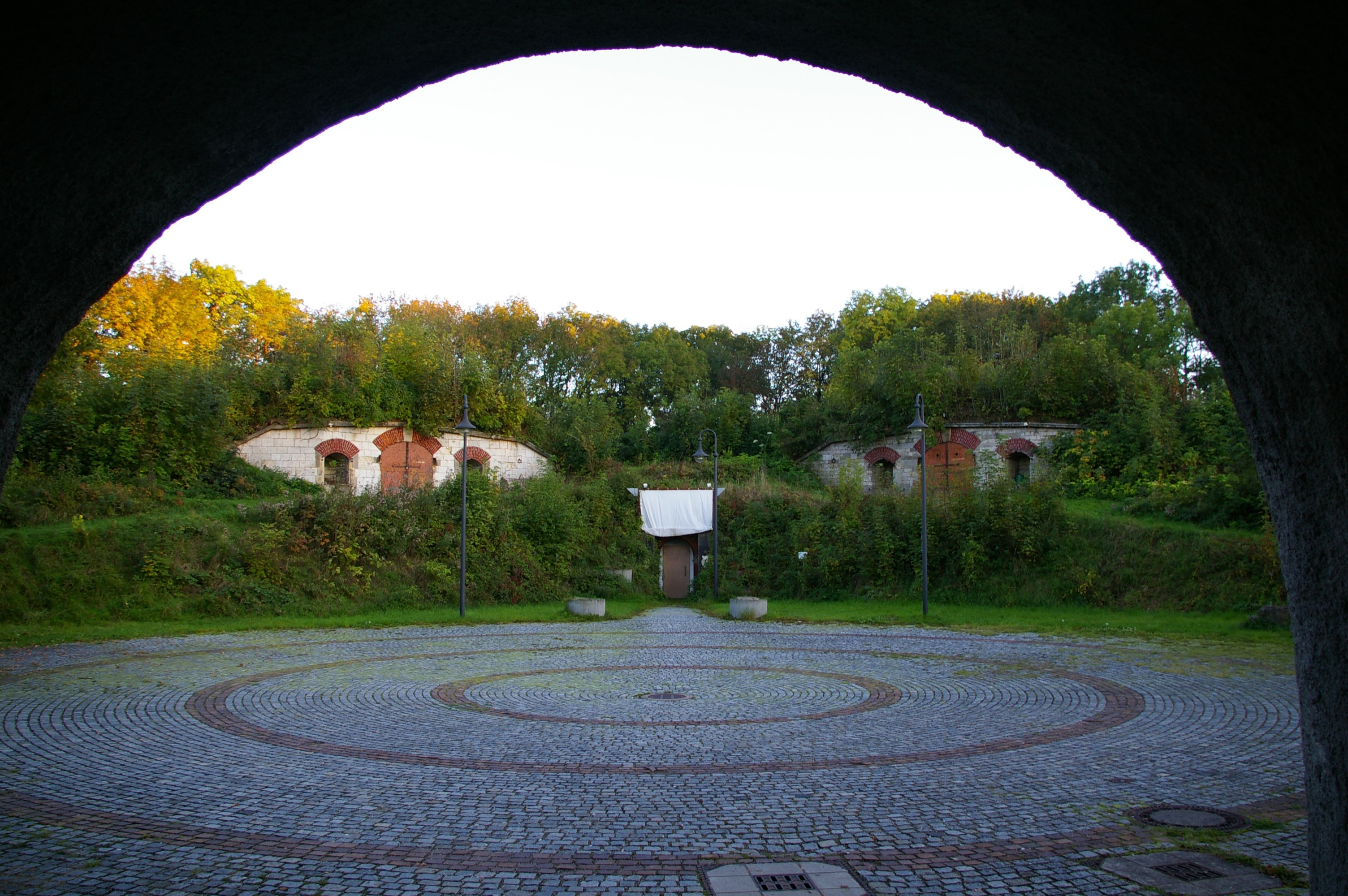 Waffenplatz der Ludwigsvorfeste